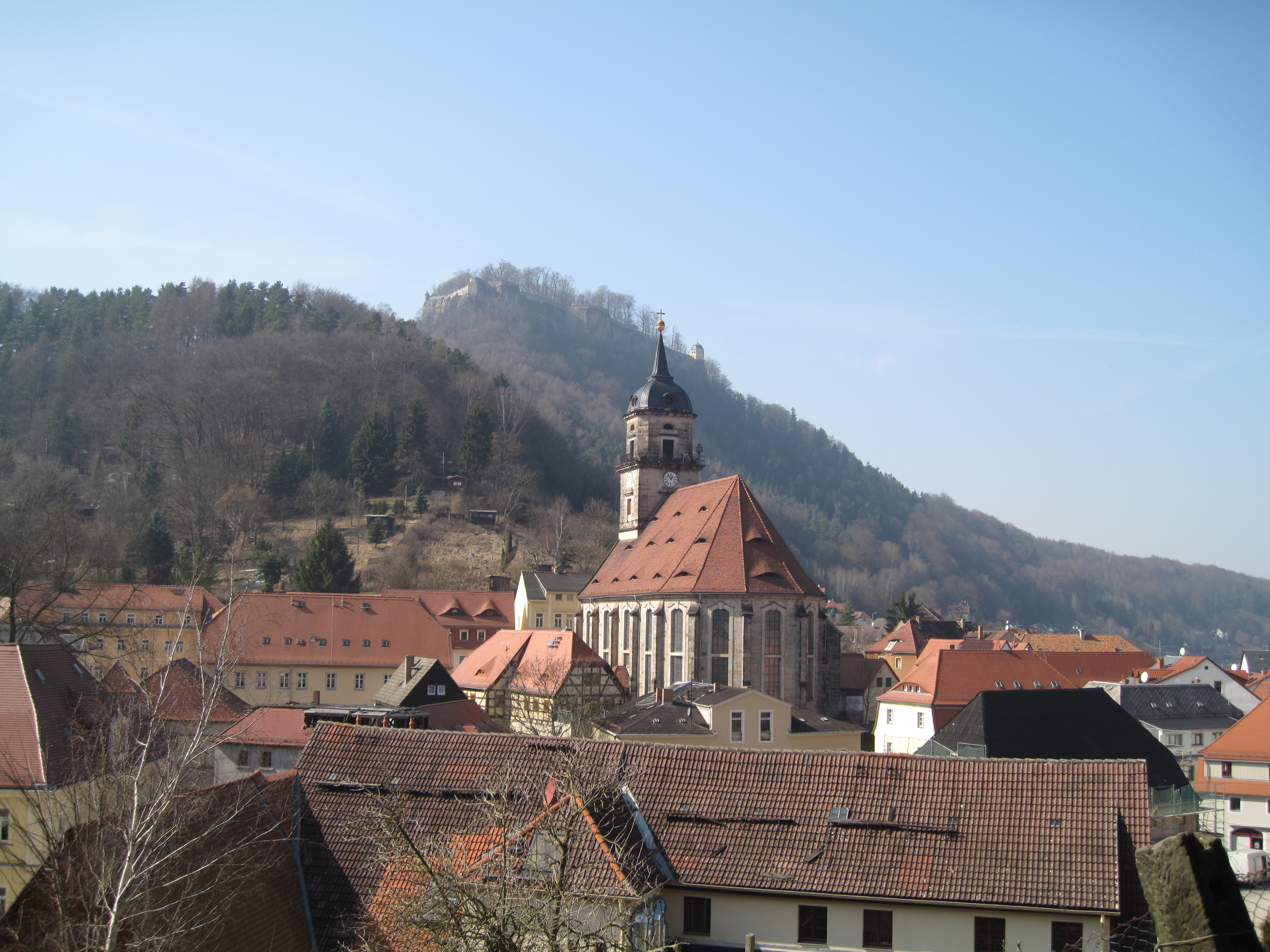 Stadtkirche St. Marien Königstein